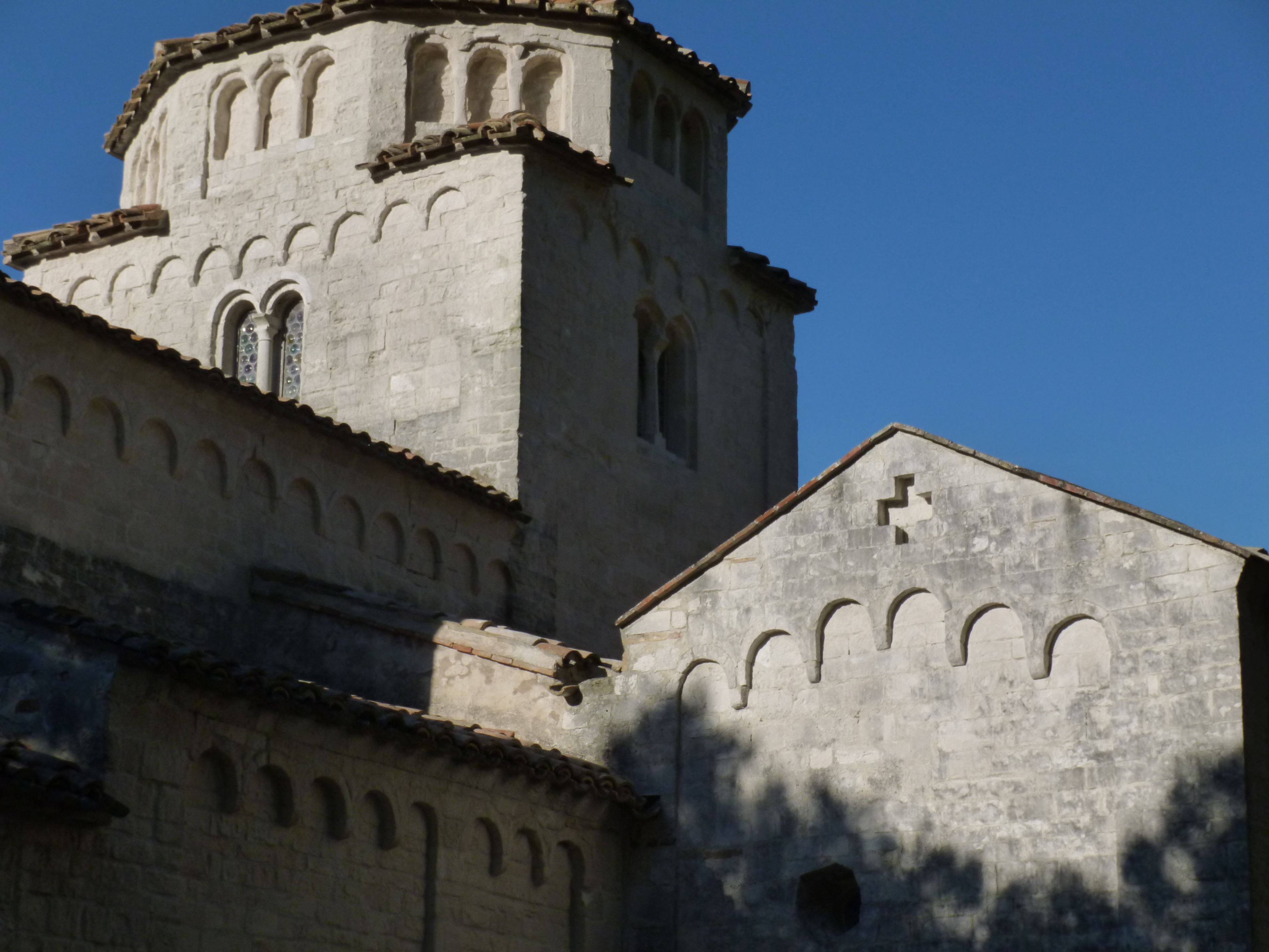 Chiesa di Santa Maria di Portonovo This is a photo of a monument which is part of cultural heritage of Italy.